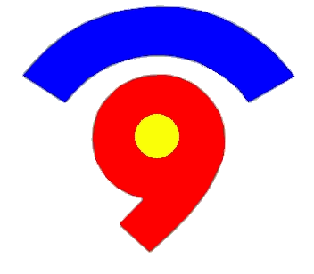 Derivado de File:C9 logo ant.JPG